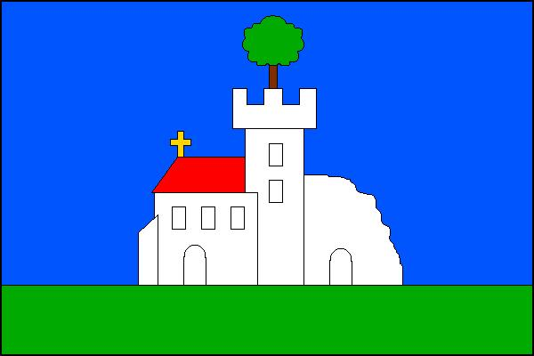 Vlajka obce Žulová